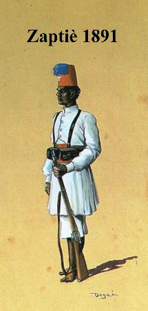 Zaptie